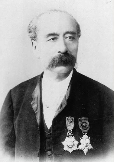 Портрет композитора Тиграна Чухаджяна